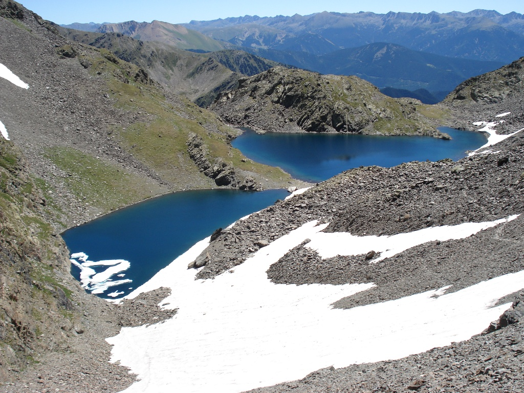 Estanys Forcats des del camí a la collada dels Estanys Forcats.